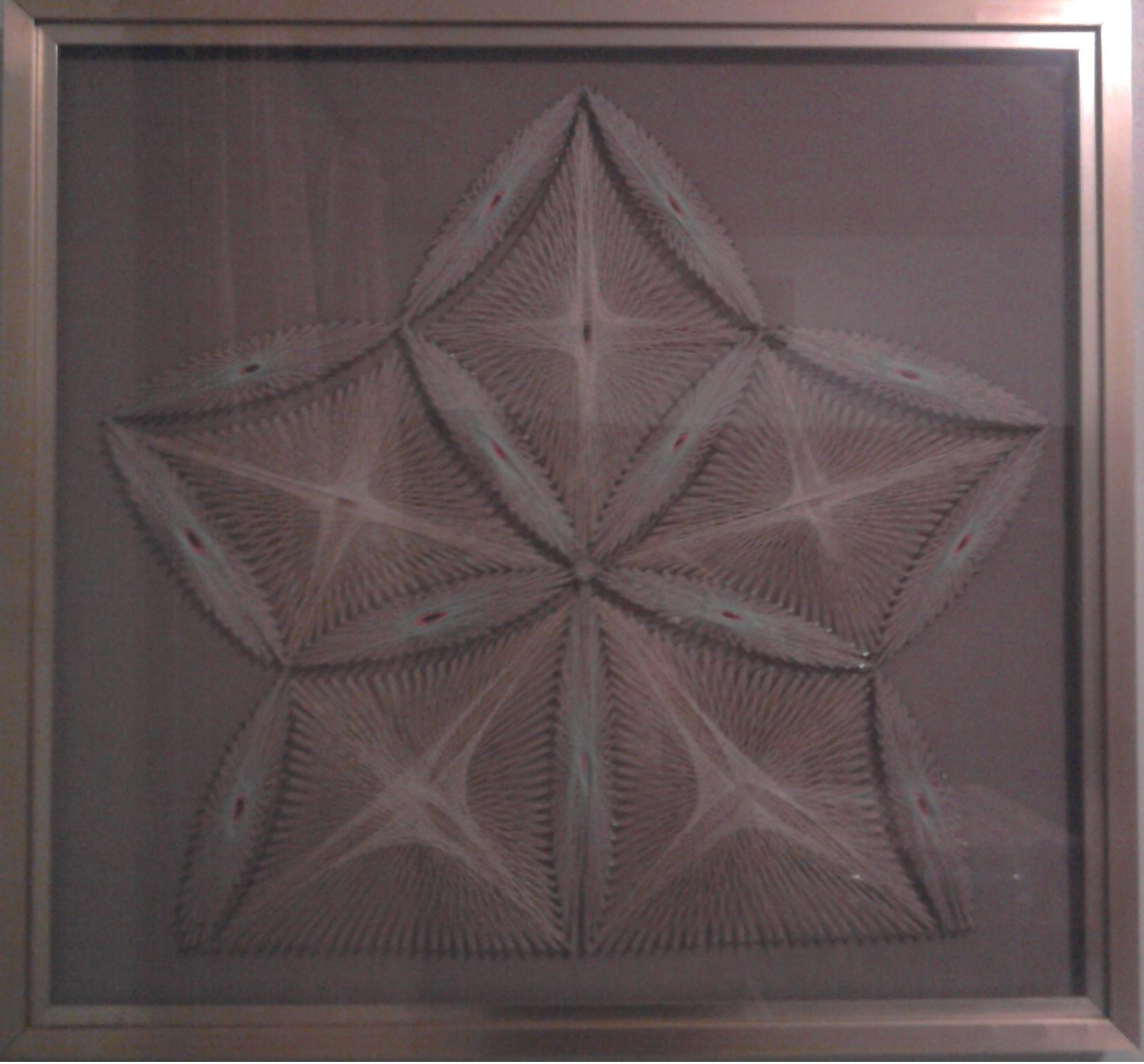 Rappresentazione artistica dell'Ingresso al Belice